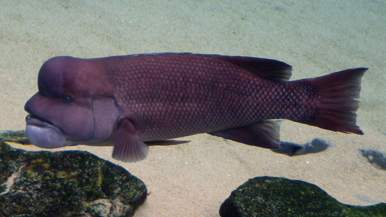 コブダイ Semicossyphus reticulatus (Valenciennes, 1839)。長崎県佐世保市・九十九島水族館「海きらら」飼育個体。